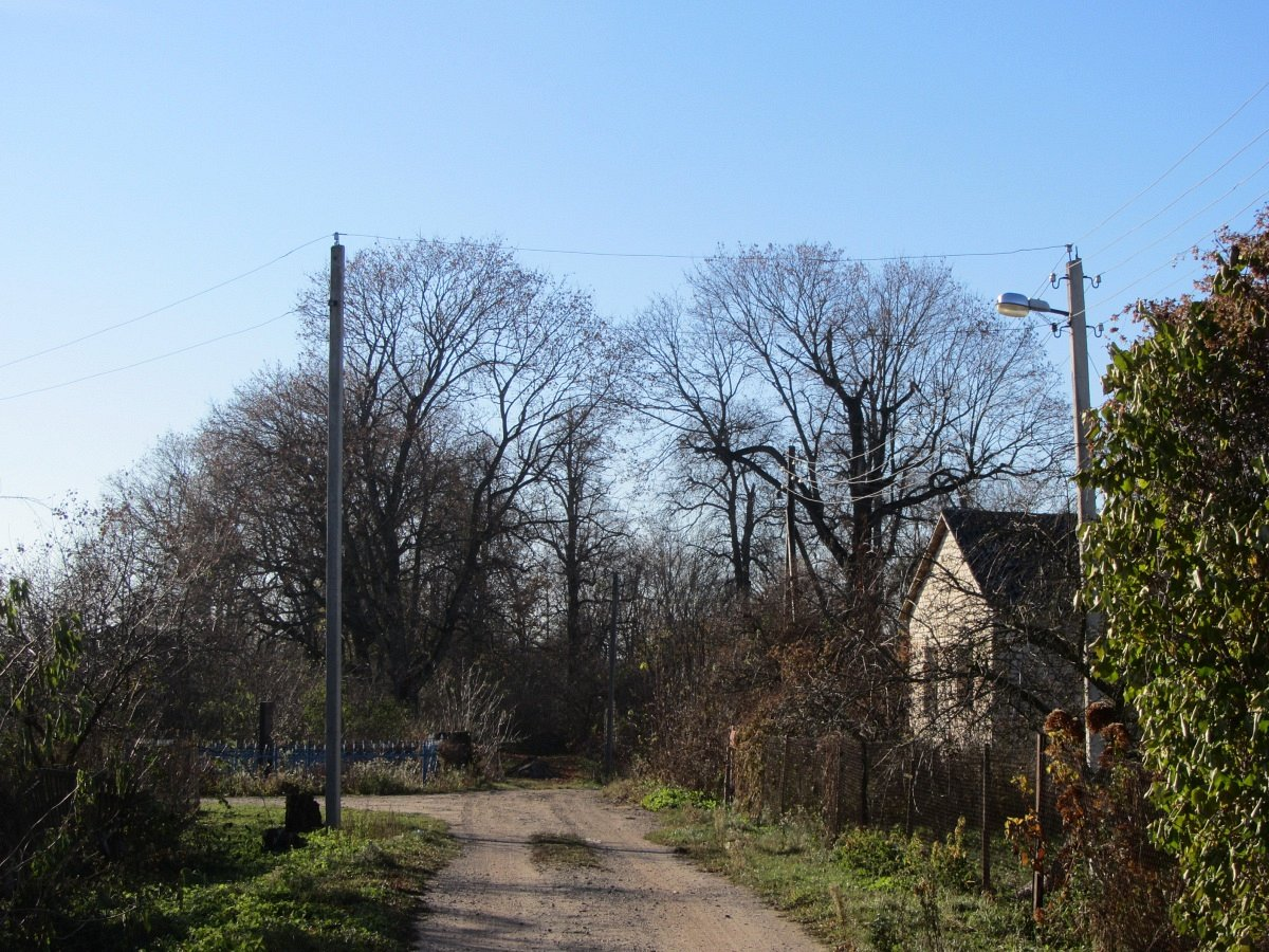 Адахаўшчына. Сядзіба Рдутлоўскіх. Парк